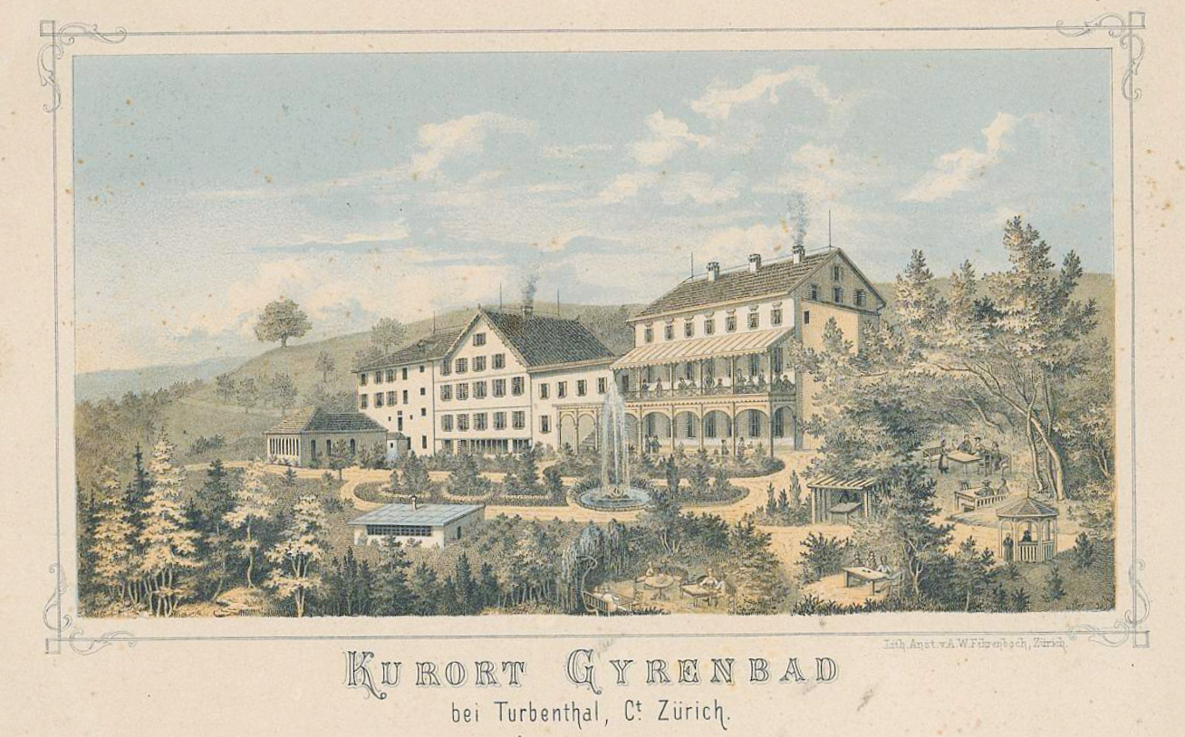 Kurort Gyrenbad bei Turbenthal, Kanton Zürich: um 1880